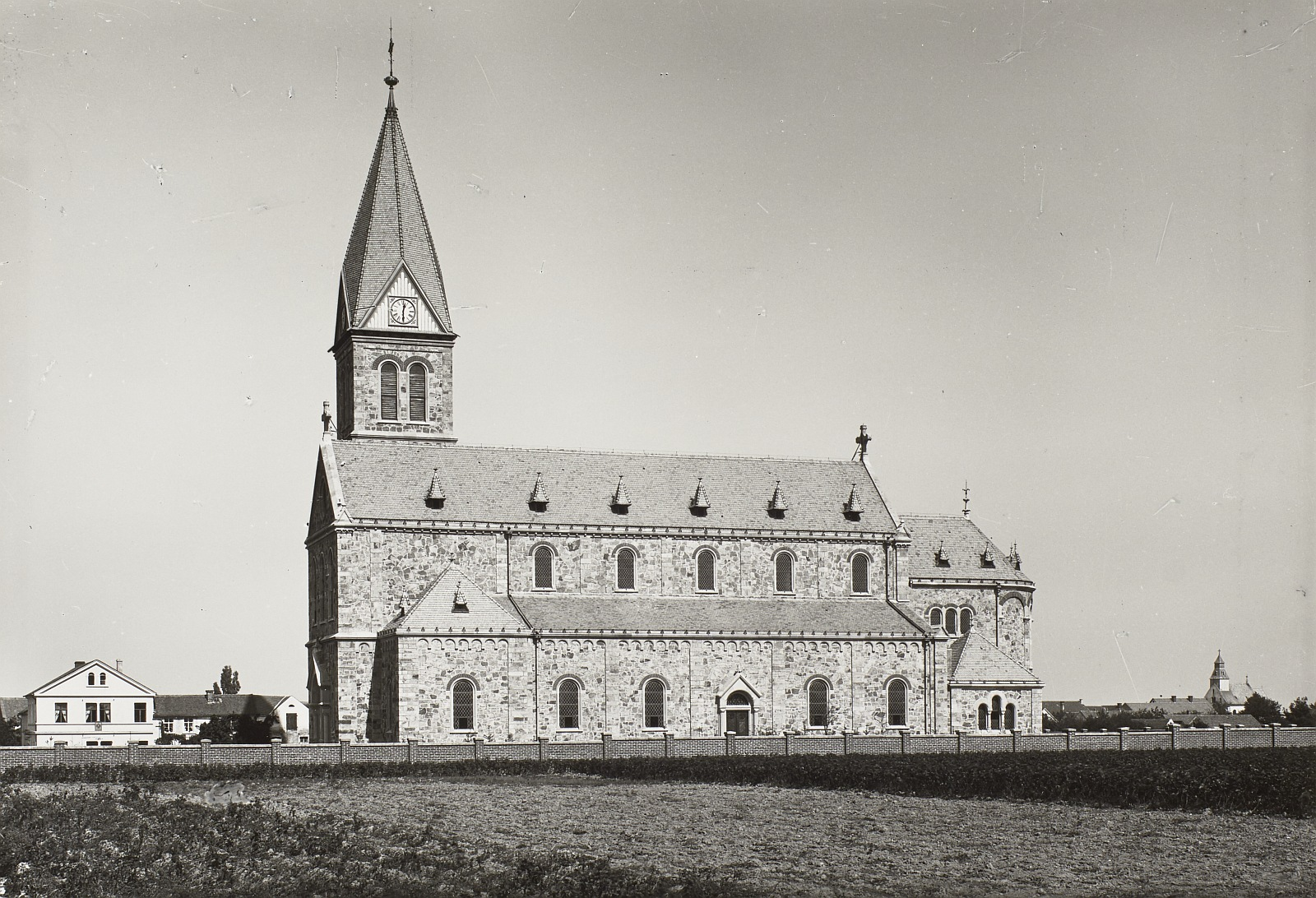 Hornjoserbsce: Nowa Radworska Cyrkej swjateje Marije, kralowny róžowca wokoło lěta 1900